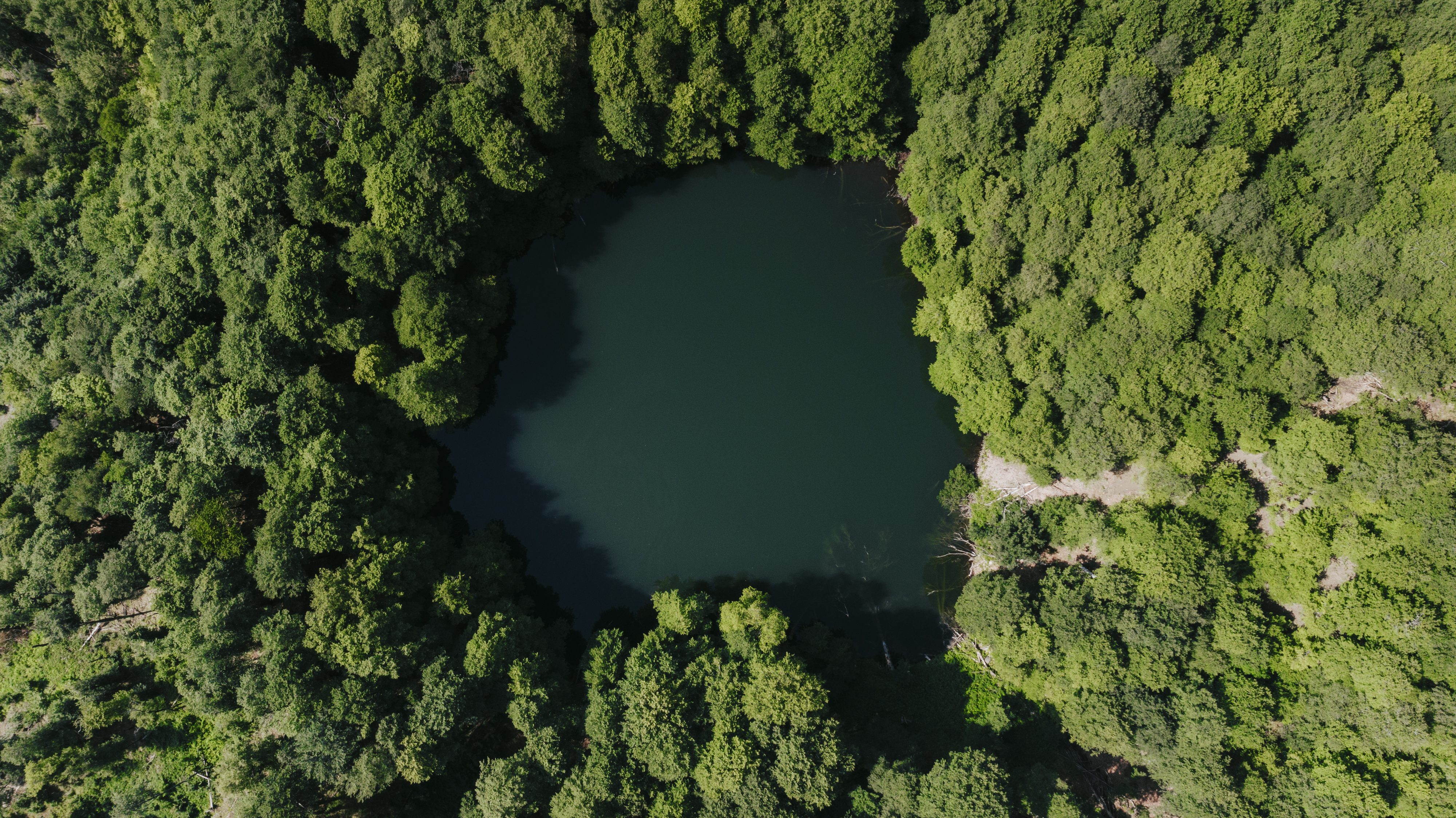 Qaranohur İsmayıllı rayonu